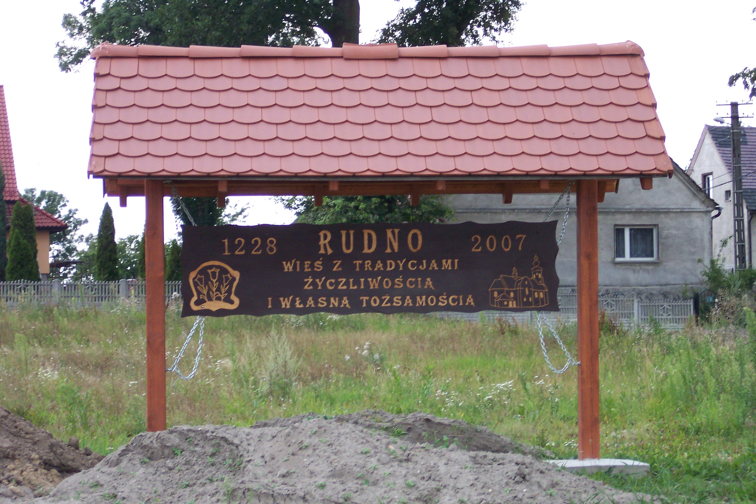 Tablica powitalna w Rudnie